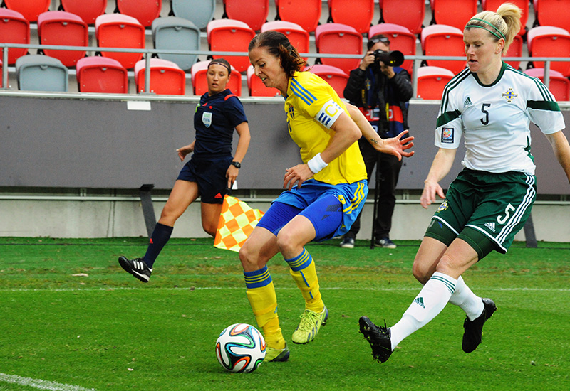 Irish defender Julie Nelson (R) challenges Sweden's Lotta Schelin (L)